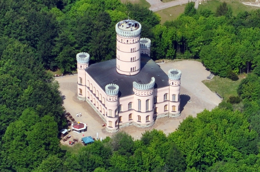 Die Bilder wurden von mir während eines einstündigen Rundflugs ab Flugplatz Güttin am 21. Mai 2011 aufgenommen. Die Bildbeschreibung steht im Dateinamen. Aufgenommen mit einer Nikon D5000 durch das Seitenfenster des Flugzeugs.